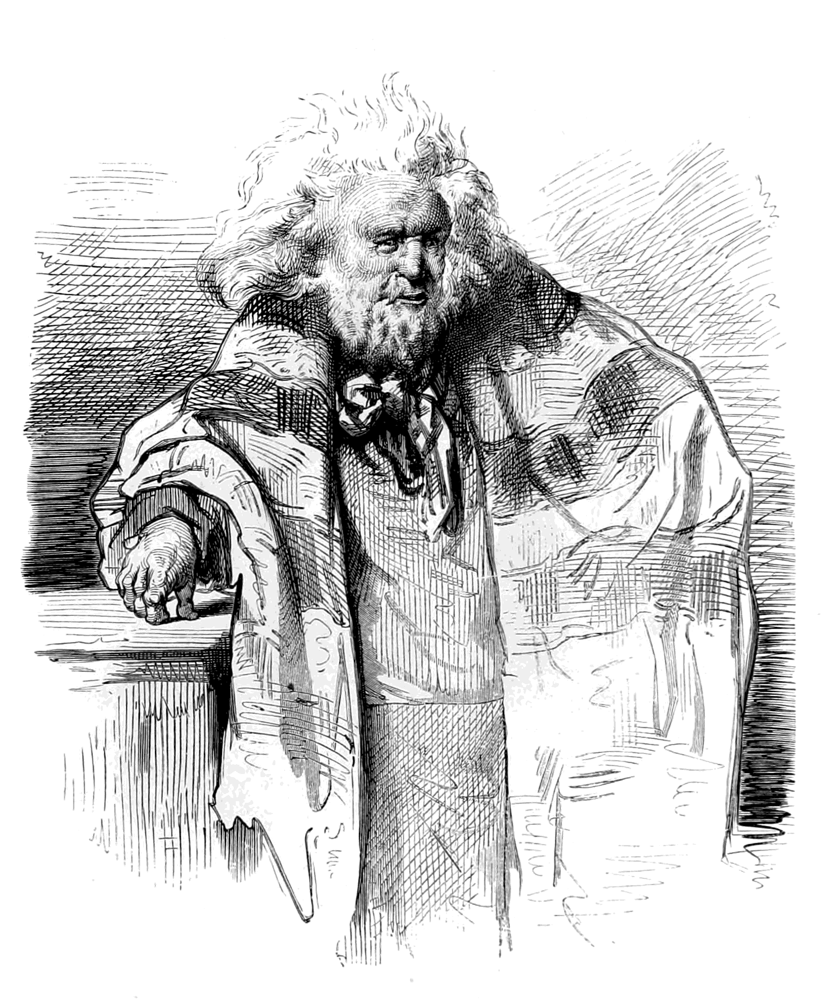 Inédits2 - 1 - d282 - Un « Rebouteux »